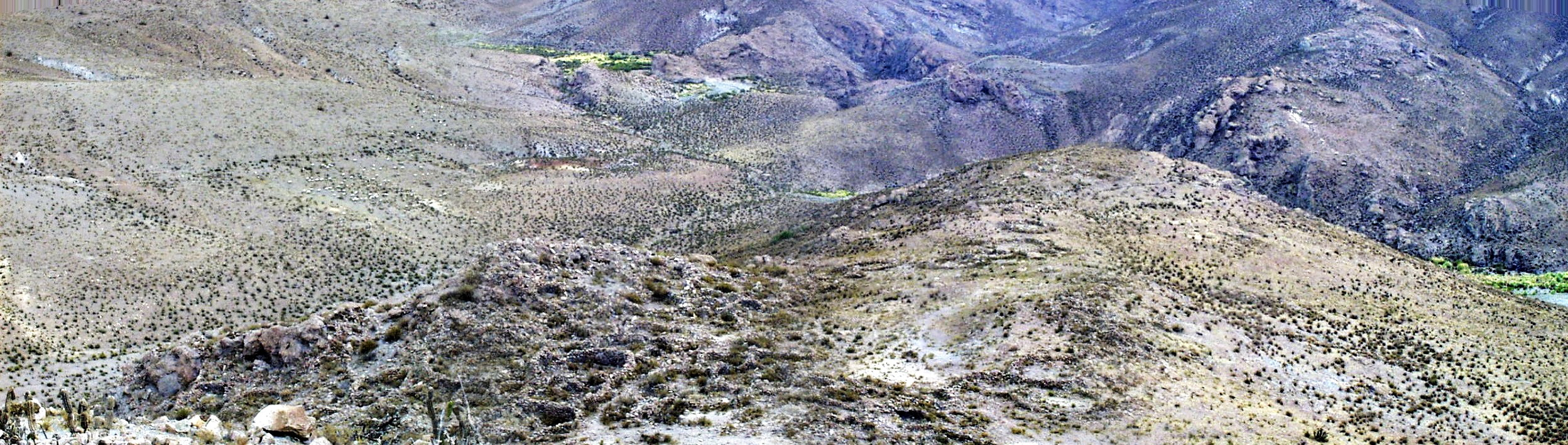 Pucará de Saxamar This is a photo of a national monument in Chile: 1282